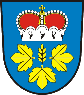 Jedná se o znak obce Kněžnice, Královehradecký kraj